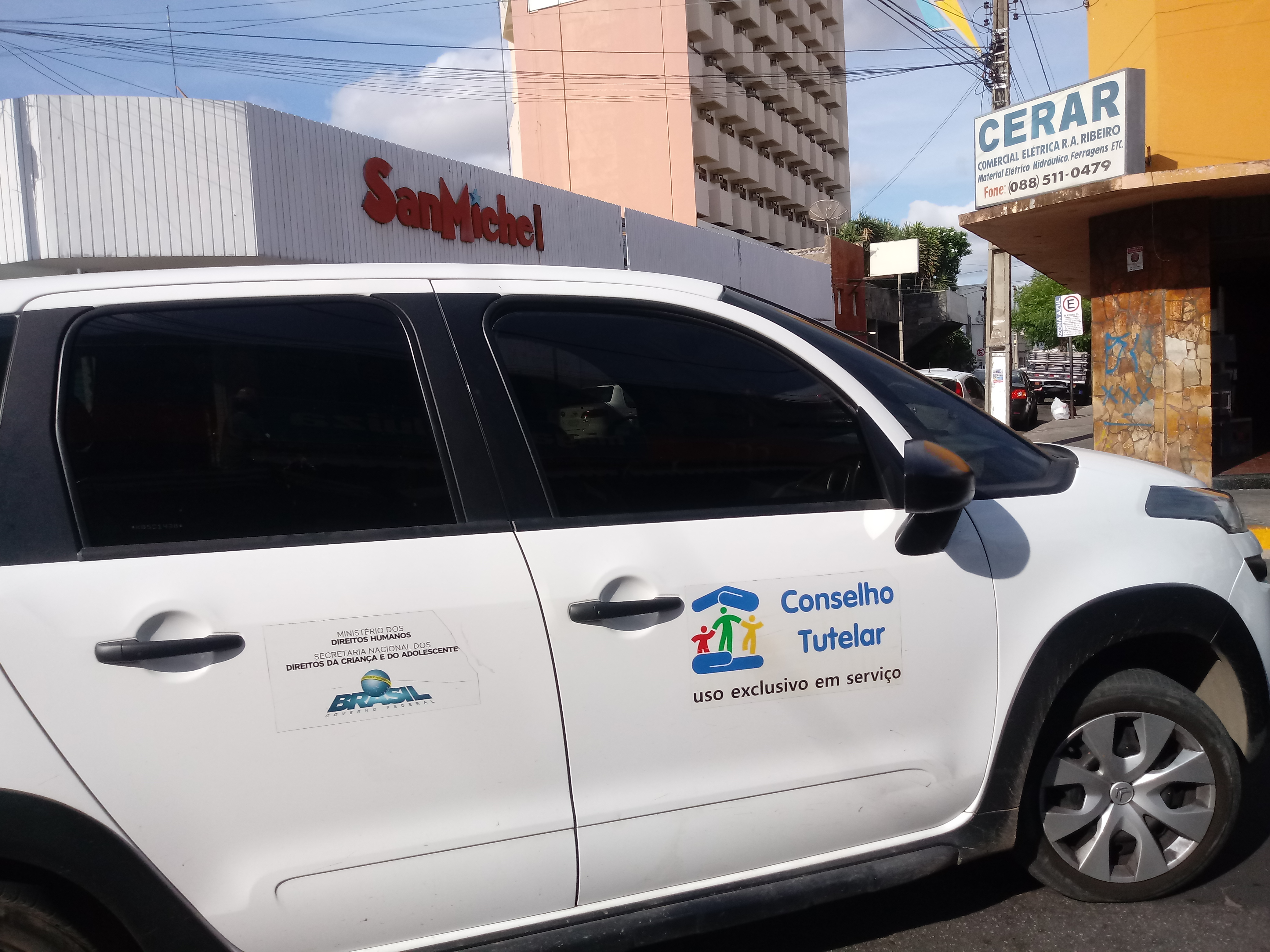 Carro do Conselho Tutelar de Juazeiro do Norte, Ceará.